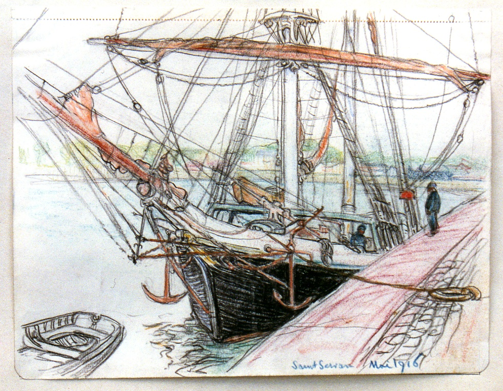 Terre-neuvas à quai à Saint-Servan,1916, dessin